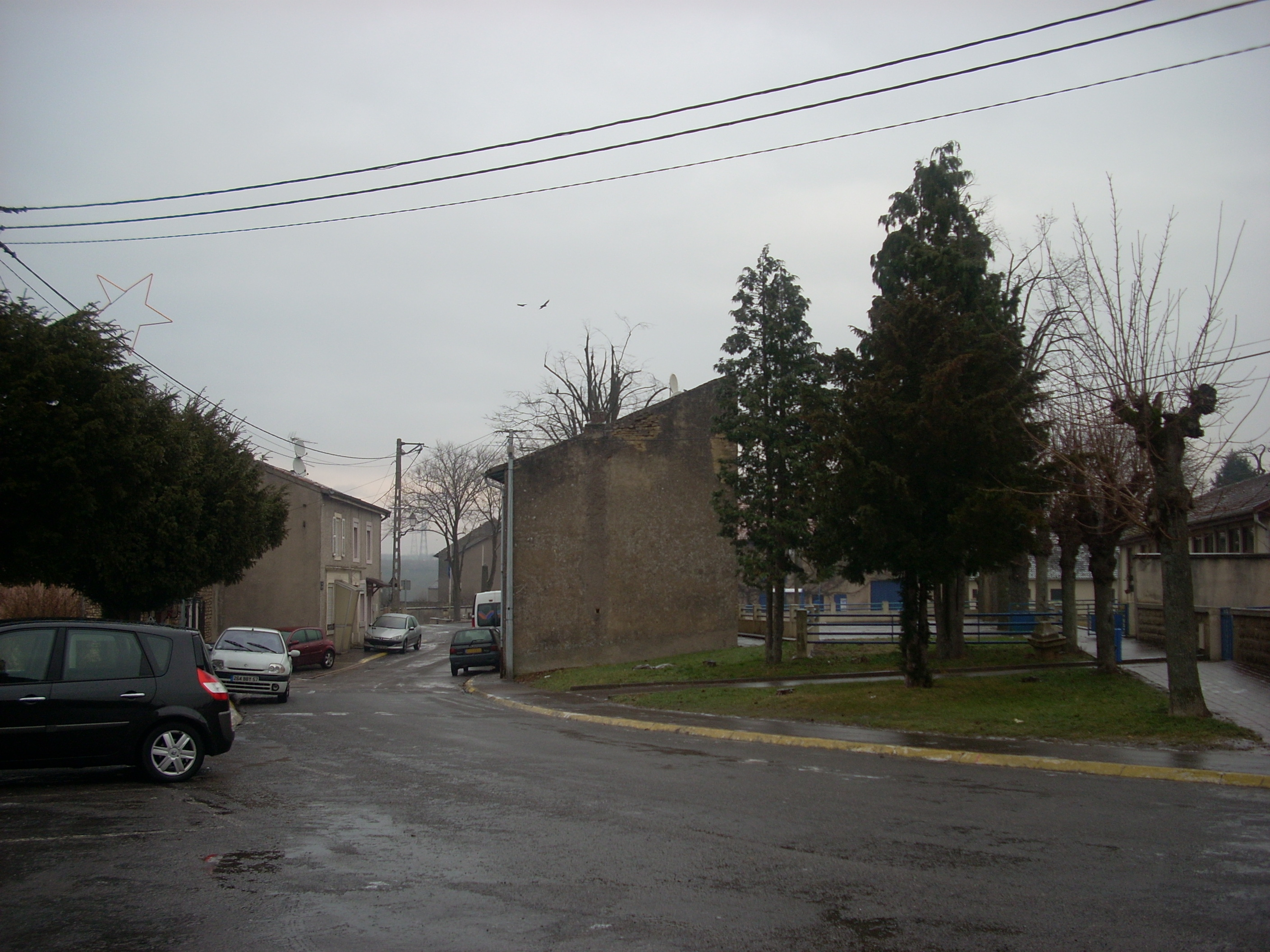 Quartier de l'église sous pluie prit en photo depuis le parvis de l'église.